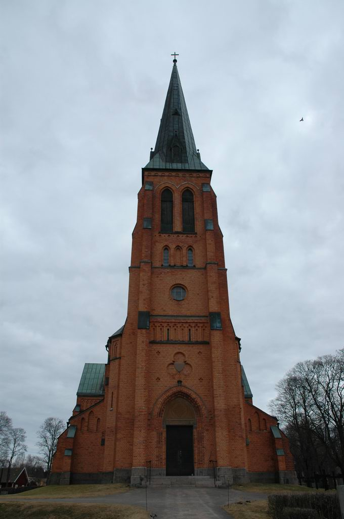 Bild tagen av mig.